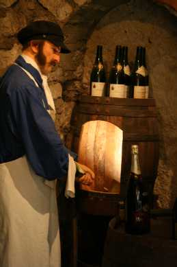 Degorgeage du champagne